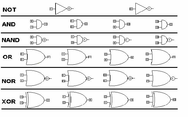 Esquemas gráficos de las operaciones lógicas en circuitos eléctricos